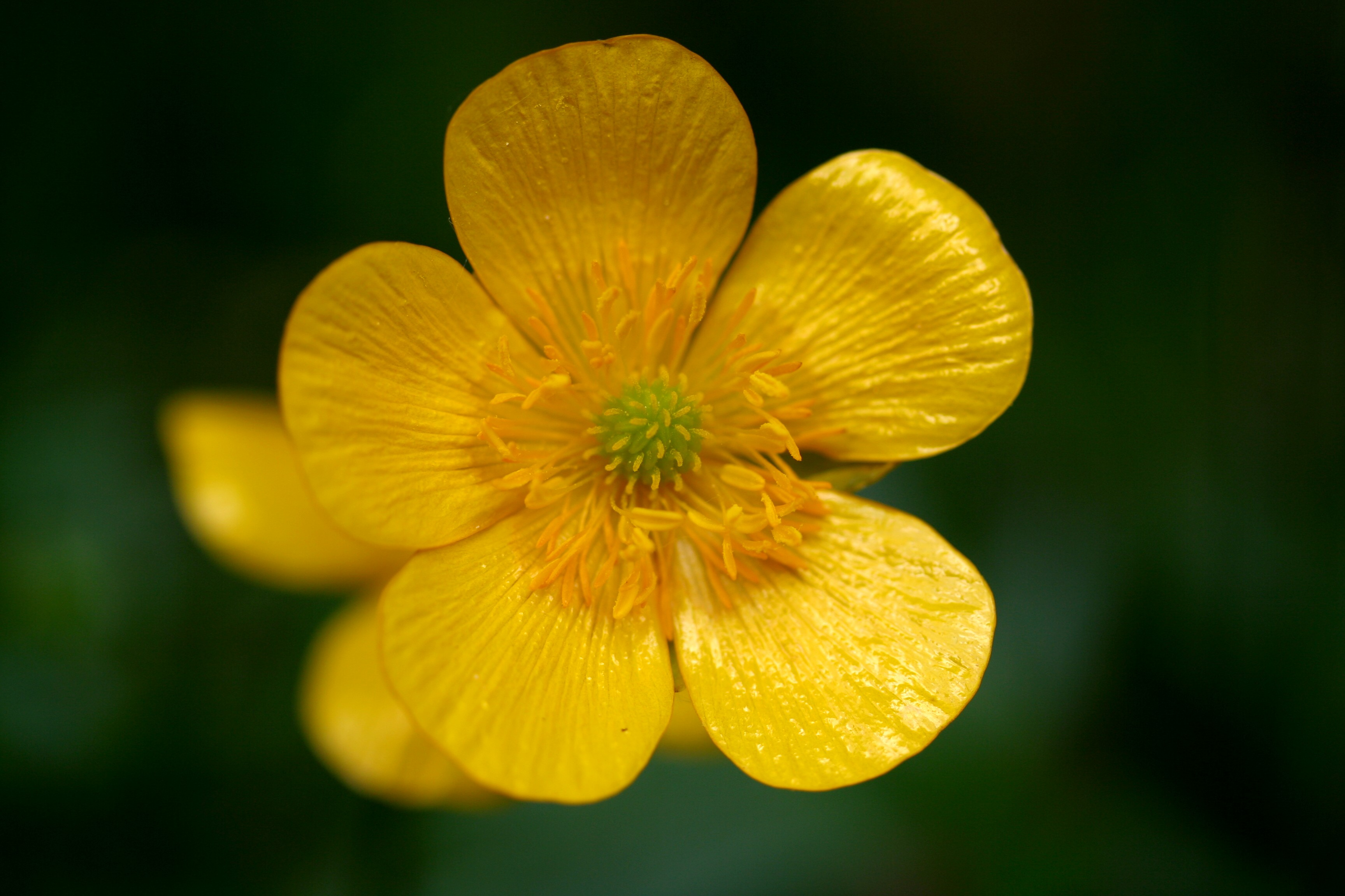 Ranuncolo comune - Località: Villa Prima, Limana (BL), 350 m s.l.m.